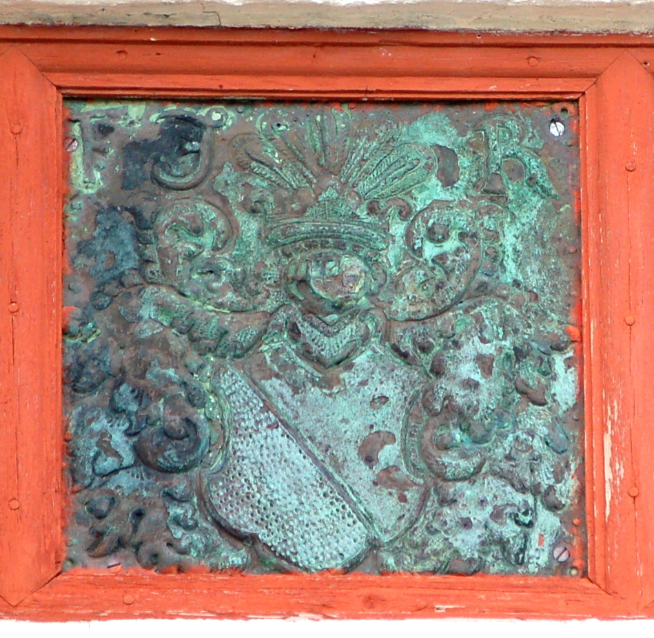 Heraldikk Austrottborgen - Rømer